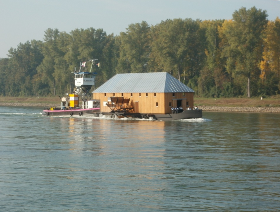 Transport der Ginsheimer Schiffsmühle auf dem Rhein bei Ketsch am 29. September 2011